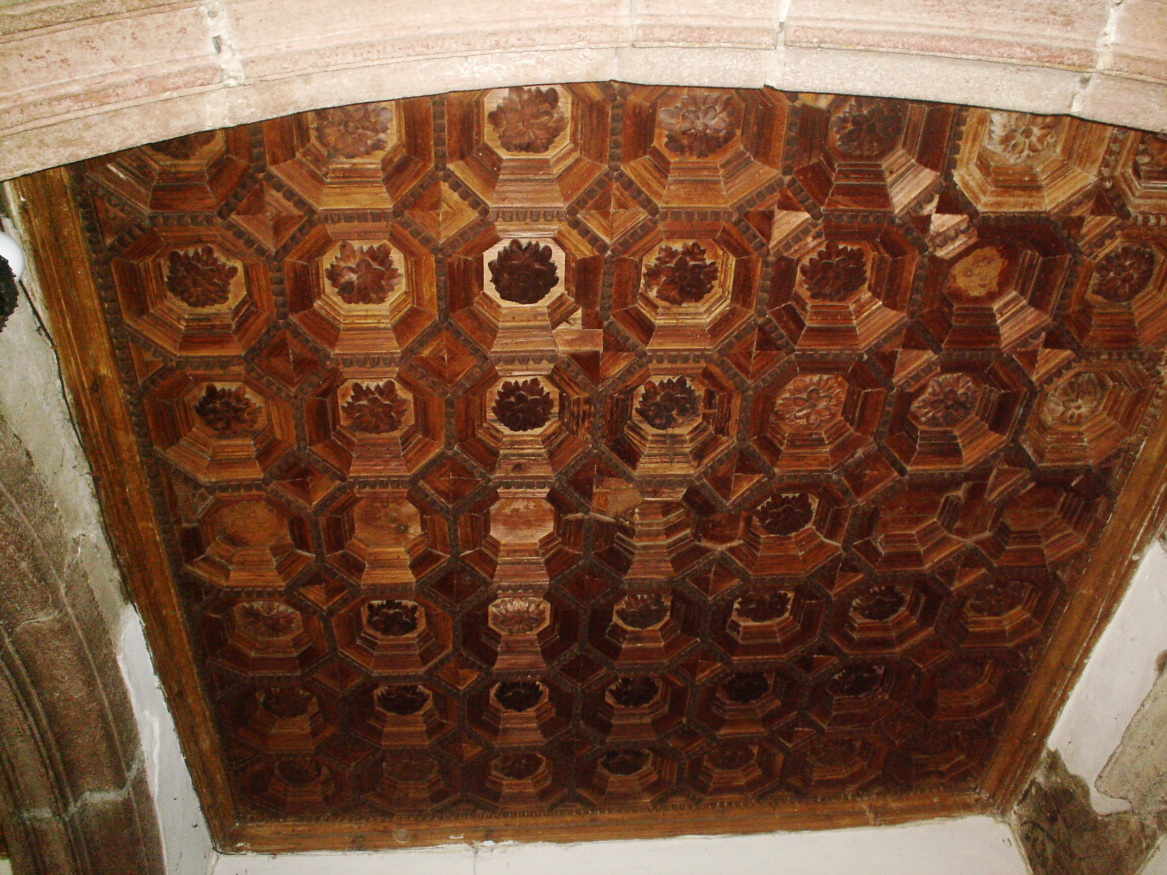 Ejemplo del artesonado en las esquinas del claustro bajo de la Parroquia de los Apóstoles Felipe y Santiago enel Centro Histórico de Azcapotzalco